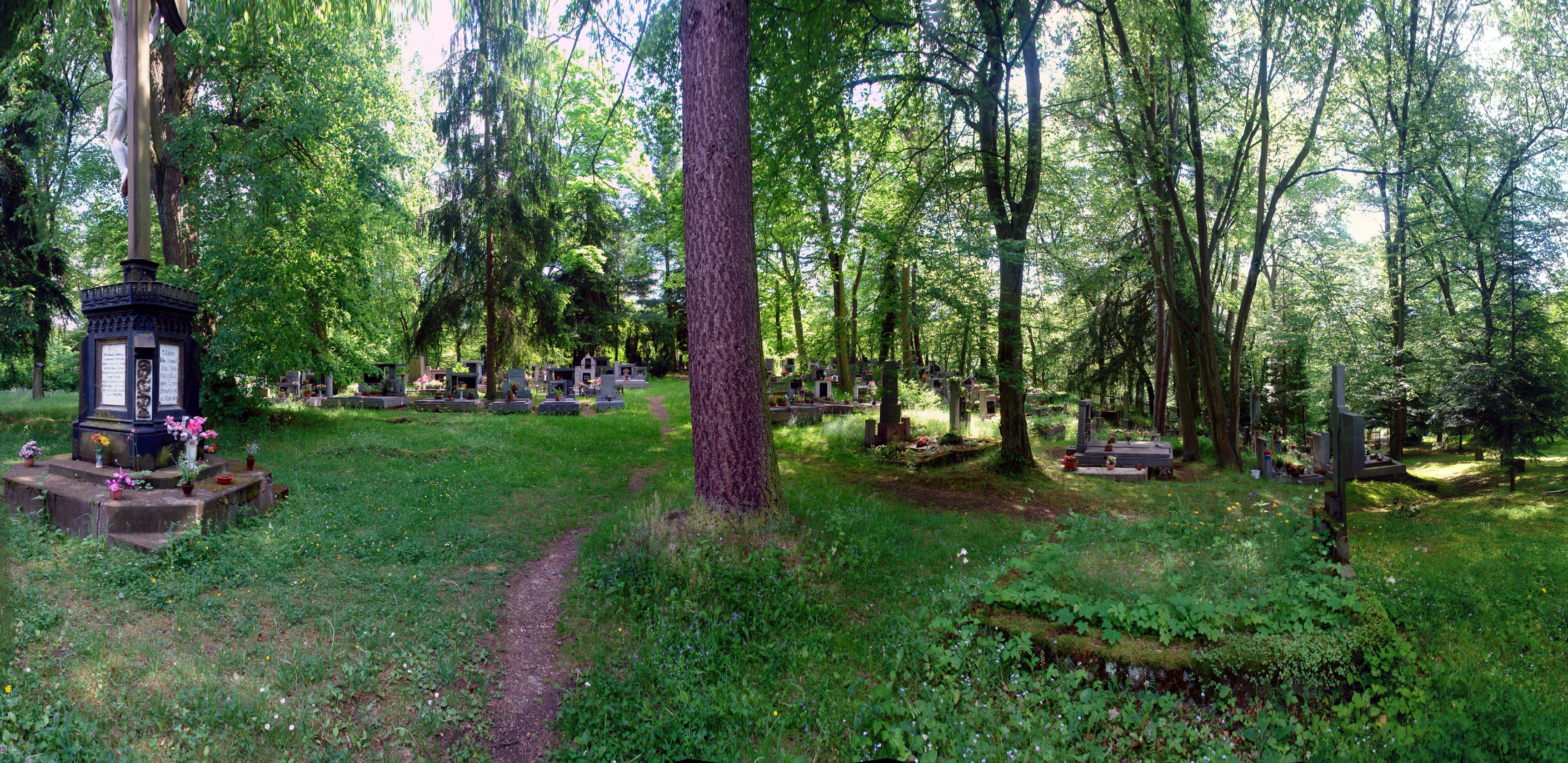 Pohled na používanou část hřbitova